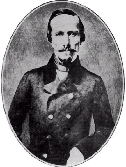 José Joaquín Vallejo Borkoski, más conocido por su seudónimo Jotabeche (19 de agosto de 1811, Copiapó - 27 de septiembre de 1858, Totoralillo, Copiapó), escritor, periodista y político chileno, primer exponente destacado del costumbrismo en su país.